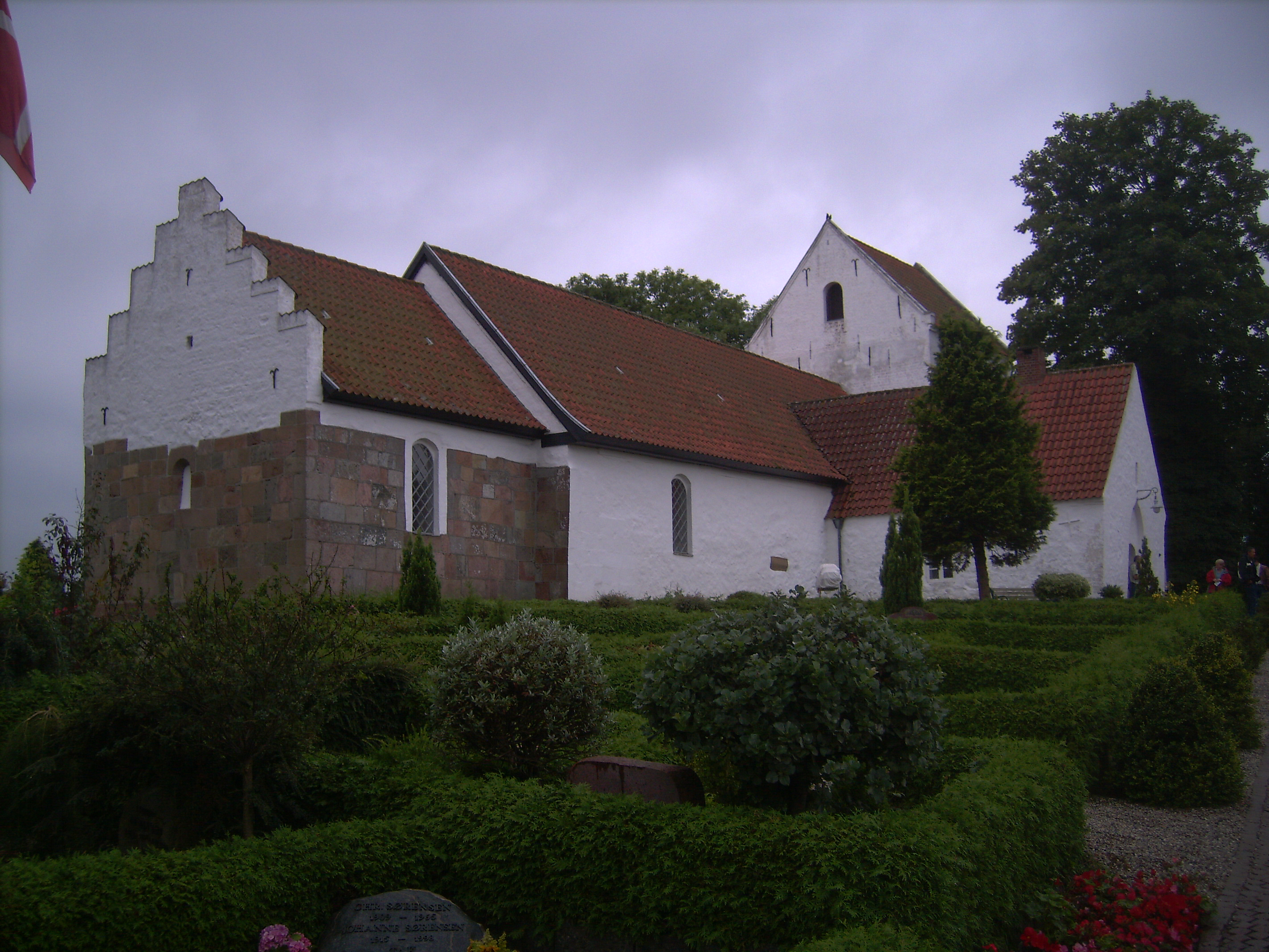 Fjellerup Kirke, Norddjurs Kommune